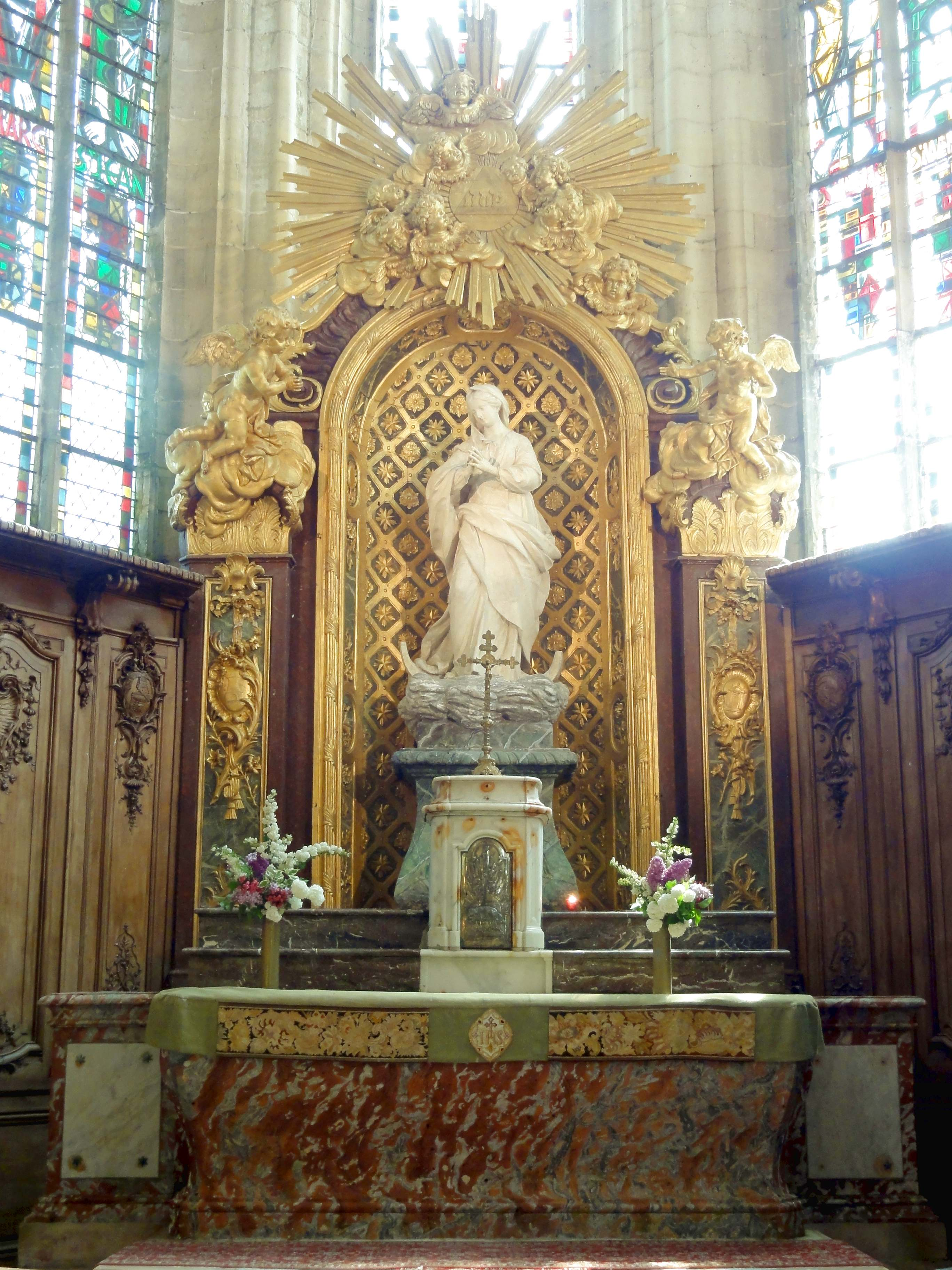 Retable du maître-autel.